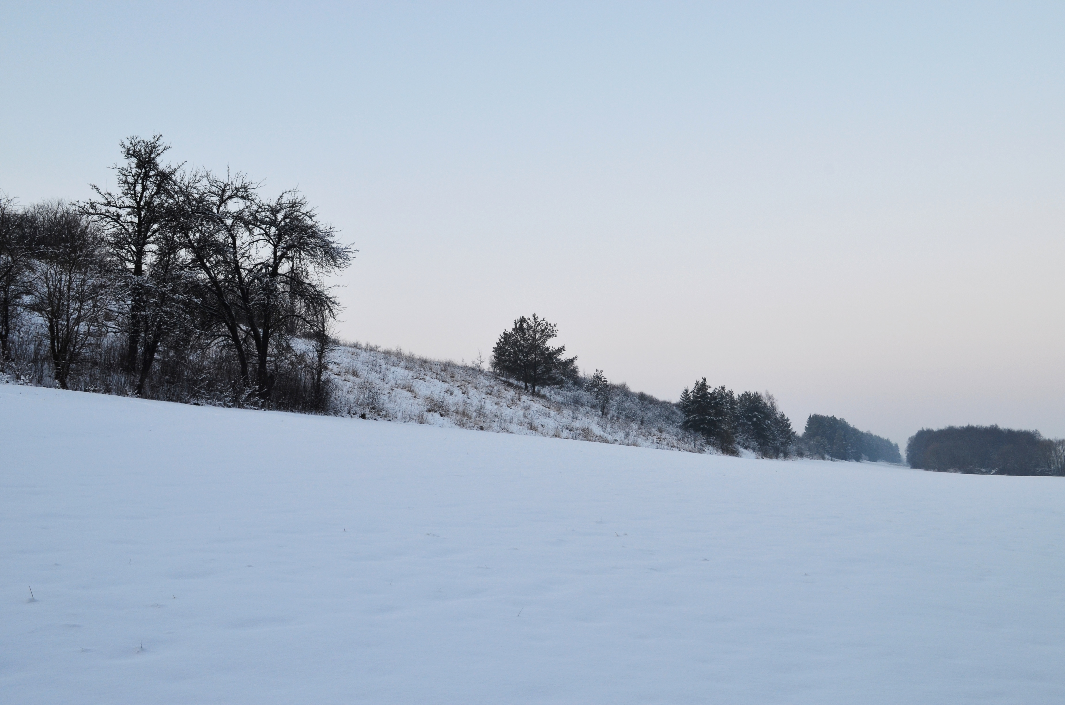 Kalnaberžės piliakalnis, Kėdainių raj.